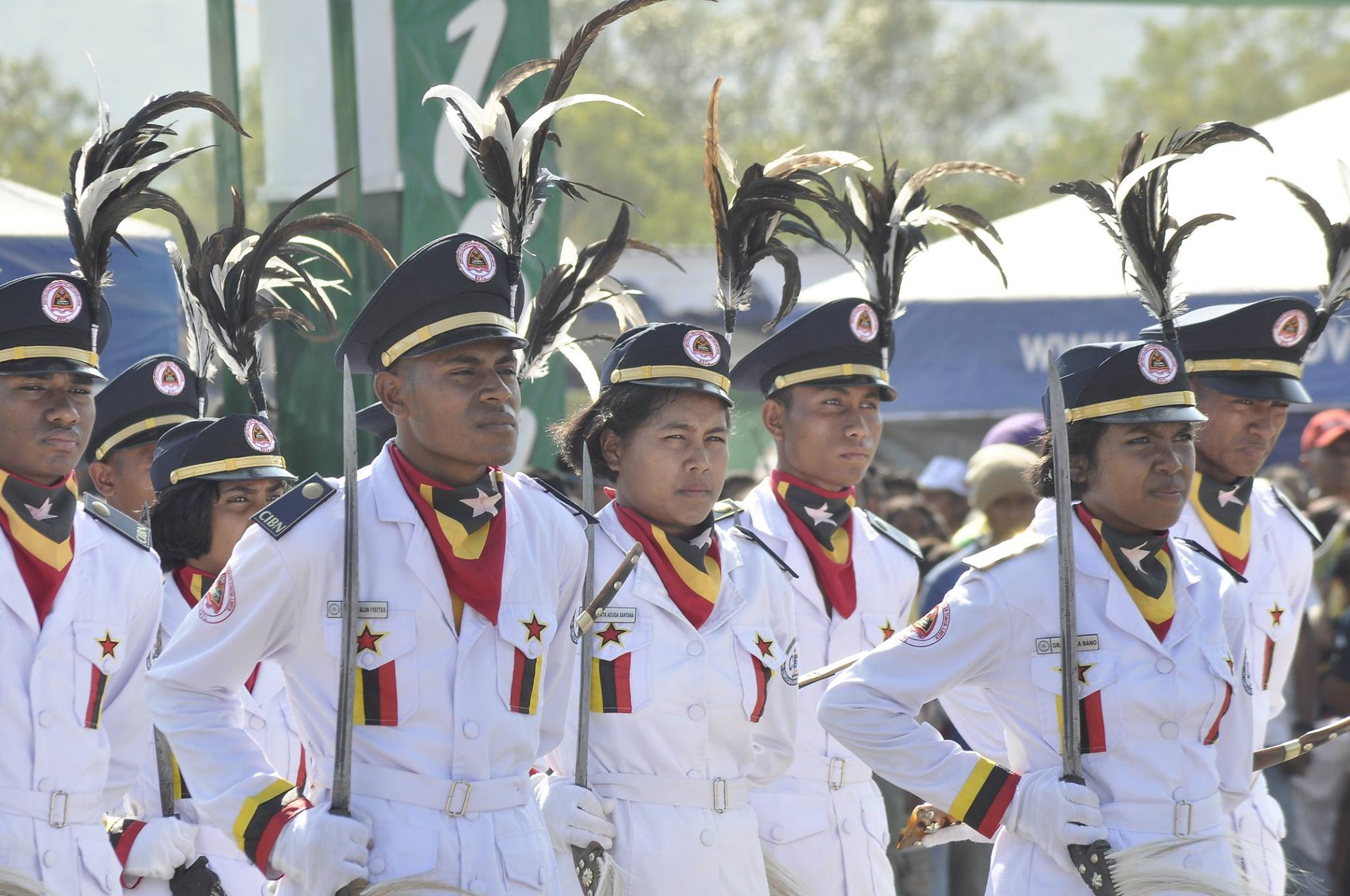 Tetun: Serimónia Komemorasaun Loron Proklamasaun Indpendénte